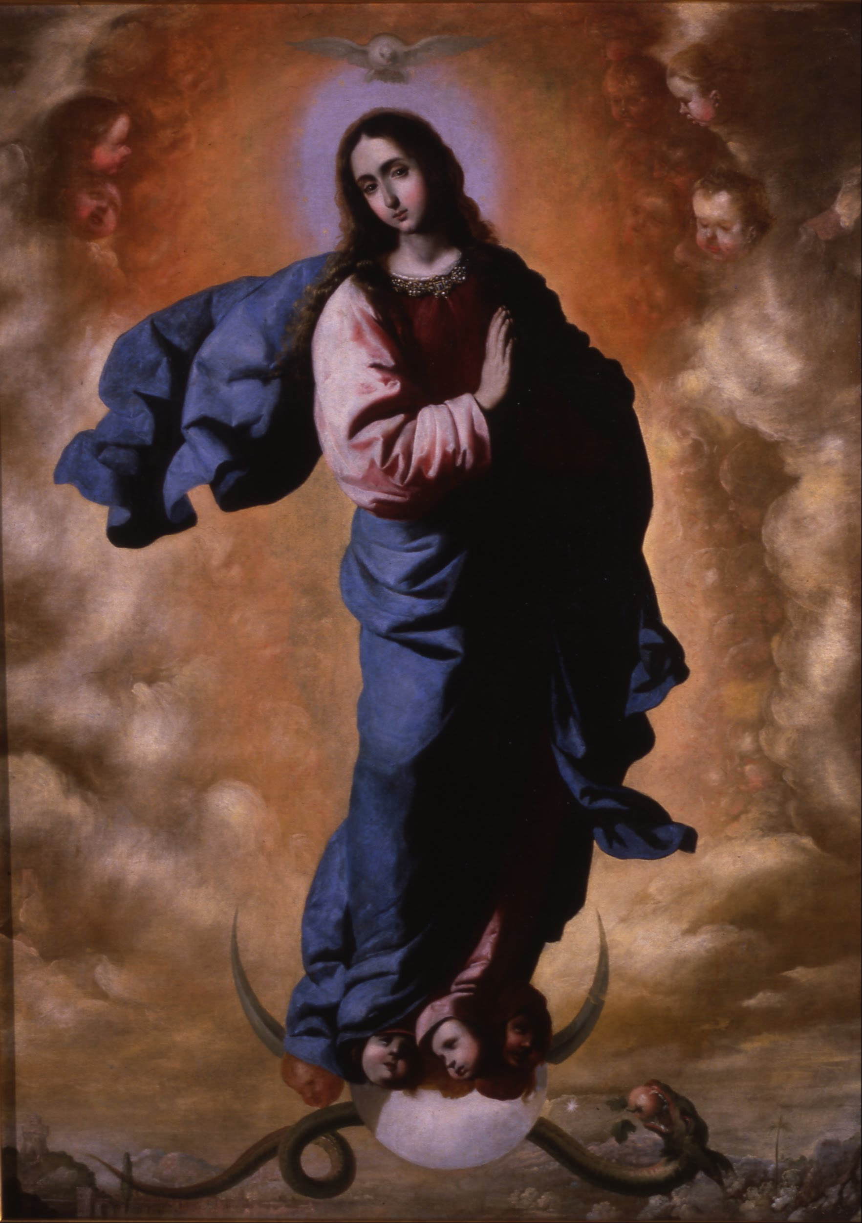 La obra representa la Inmaculada Concepción de la Virgen María, madre de Jesucristo.